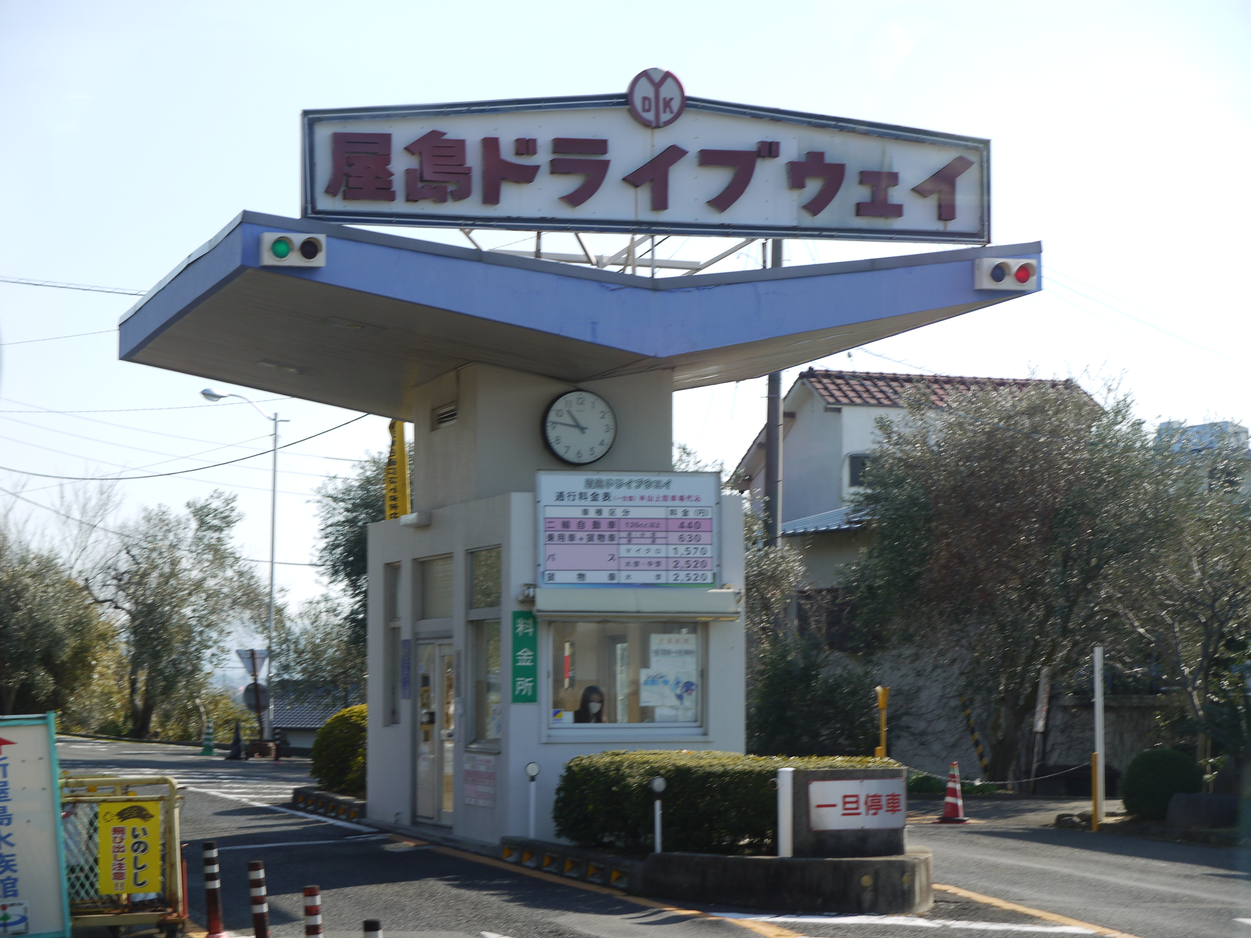 屋島ドライブウエイの料金所（撤去、消滅、2015年1月の撮影）